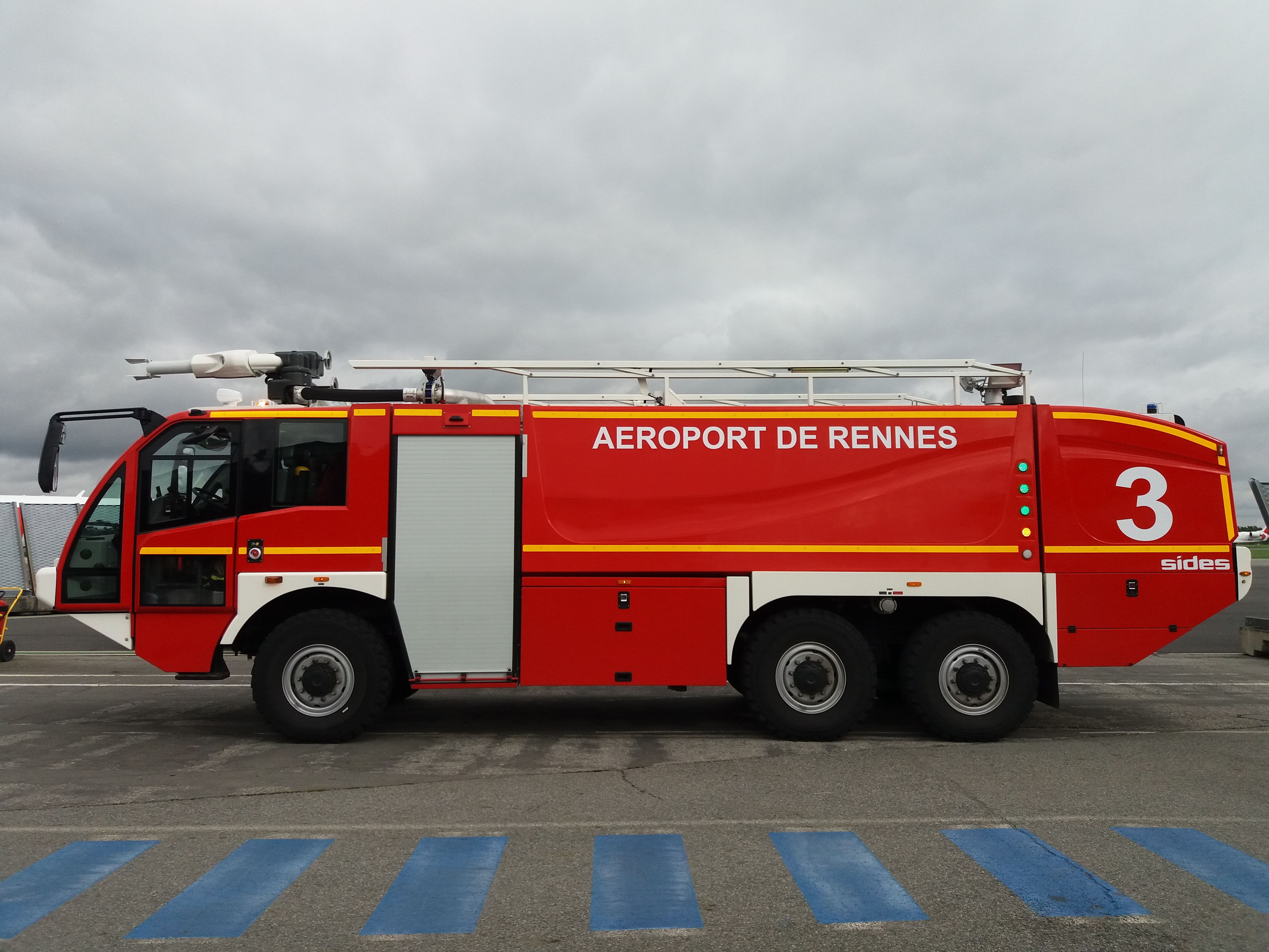 Véhicule incendie sur l'aéroport de Rennes (France)